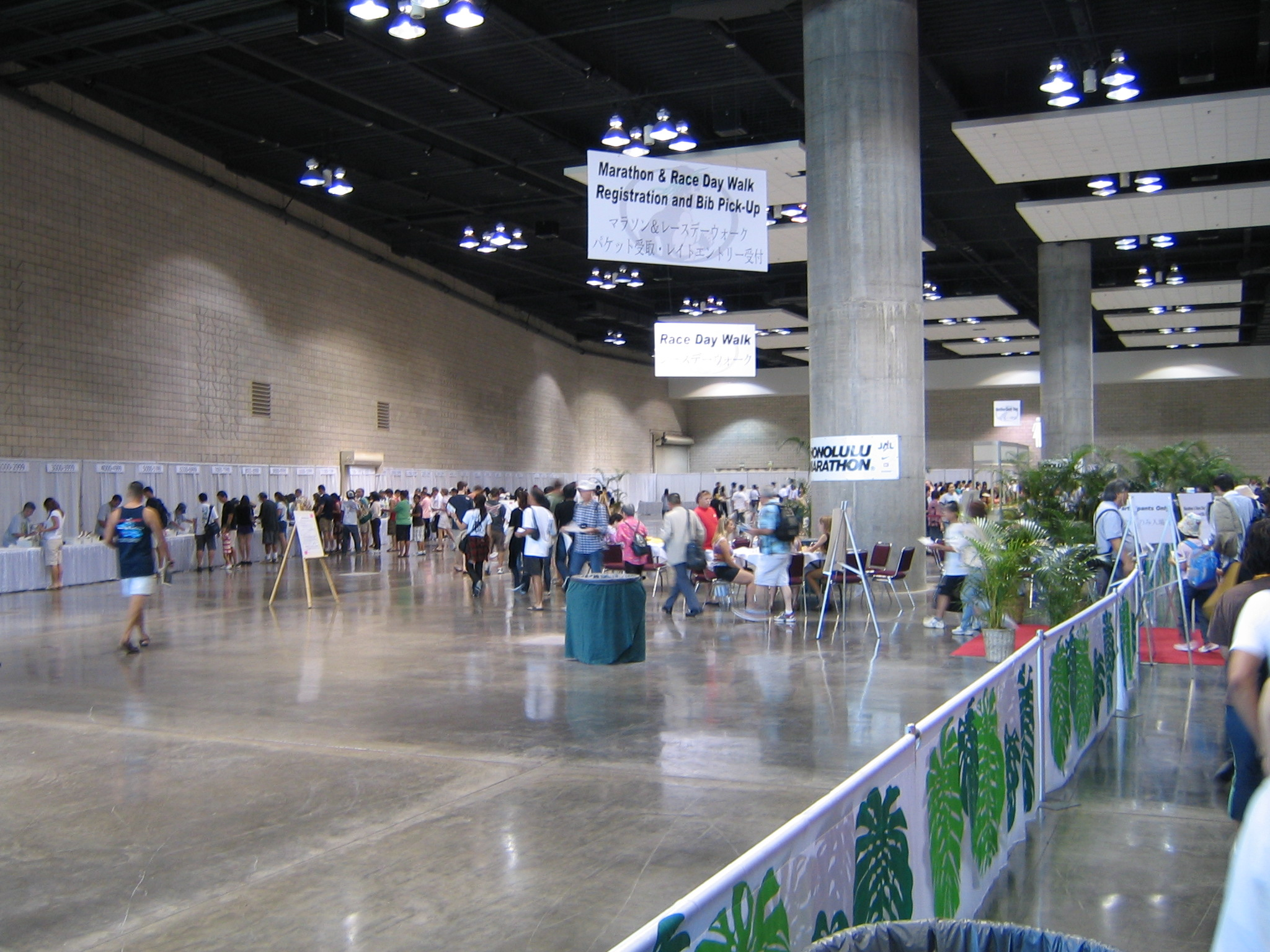 Honolulu marathon 2007 registration and bib pickup